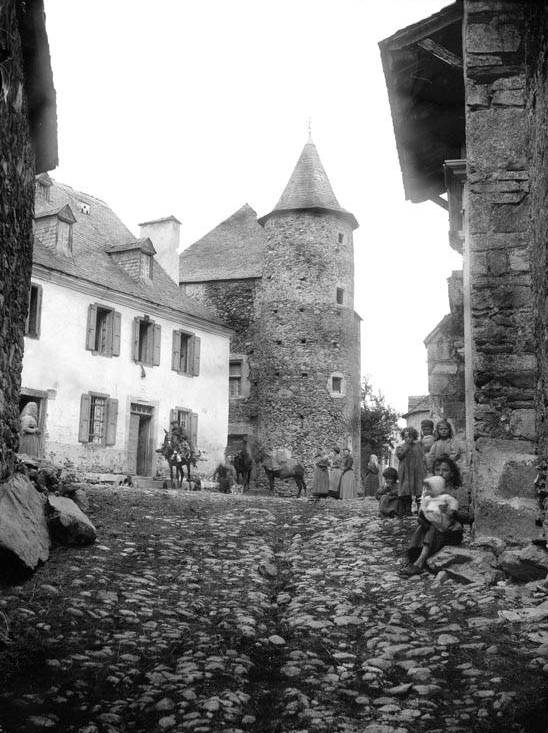 Imatge